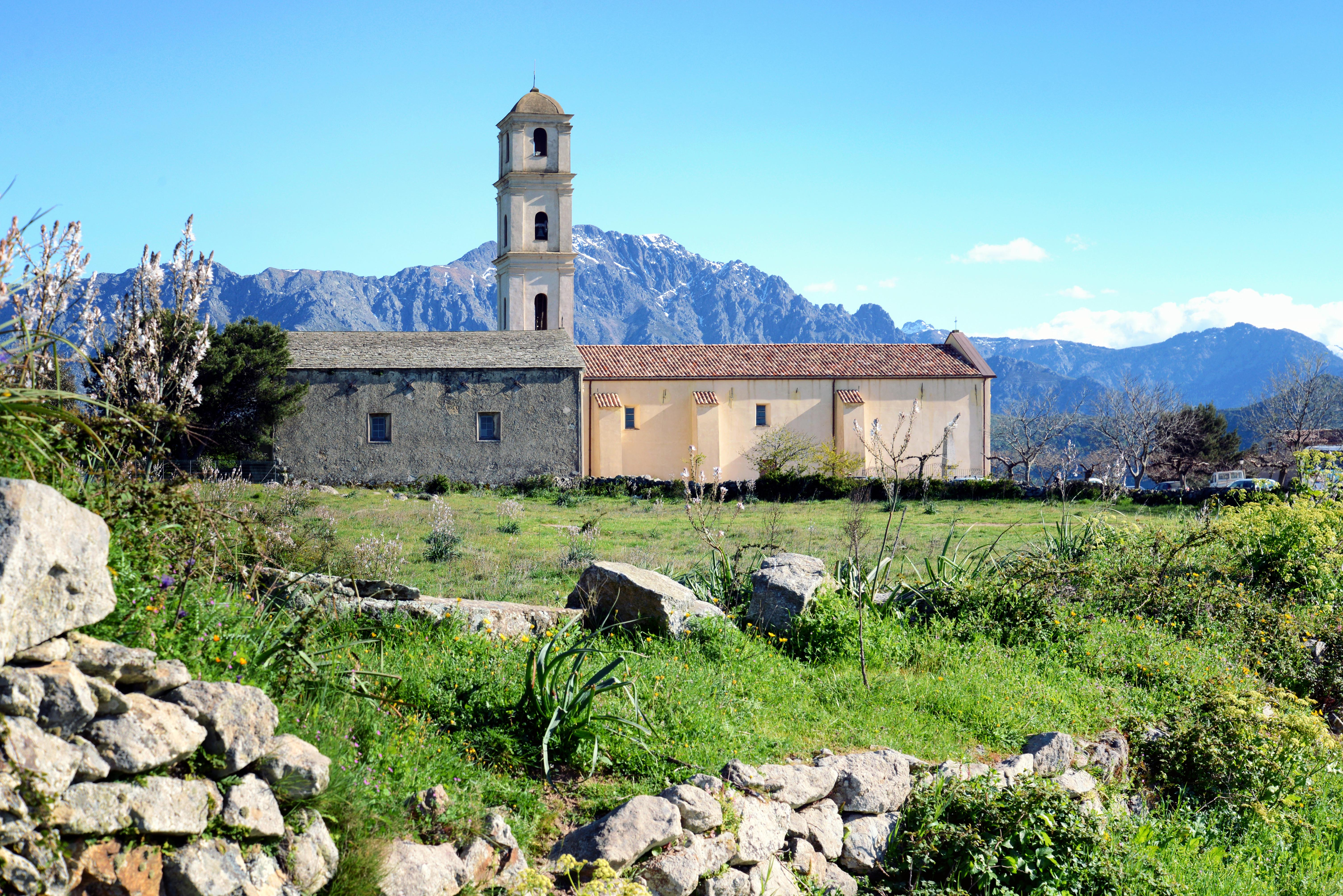 Sant'Antonino, Balagne (Corse) - Église de l'Annonciation et chapelle de confrérie. À l'arrière-plan, le Monte Grosso